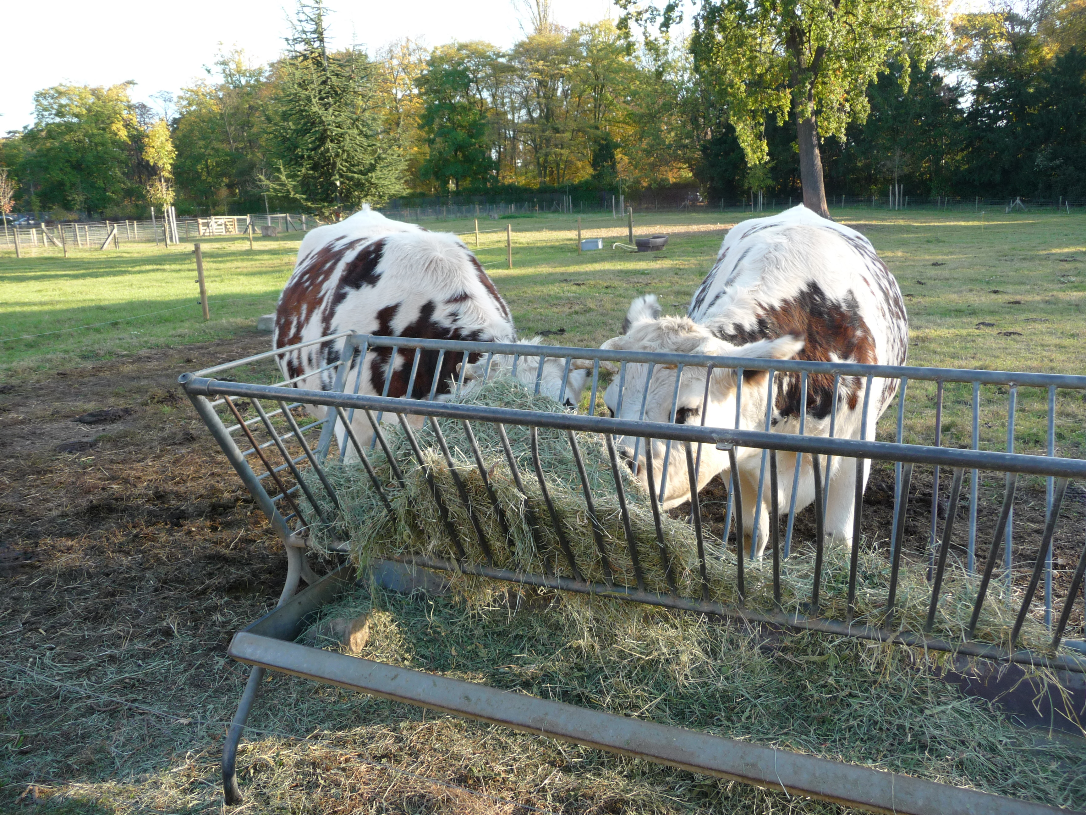 Les vaches à la ferme pédagogique Georges-Ville, France